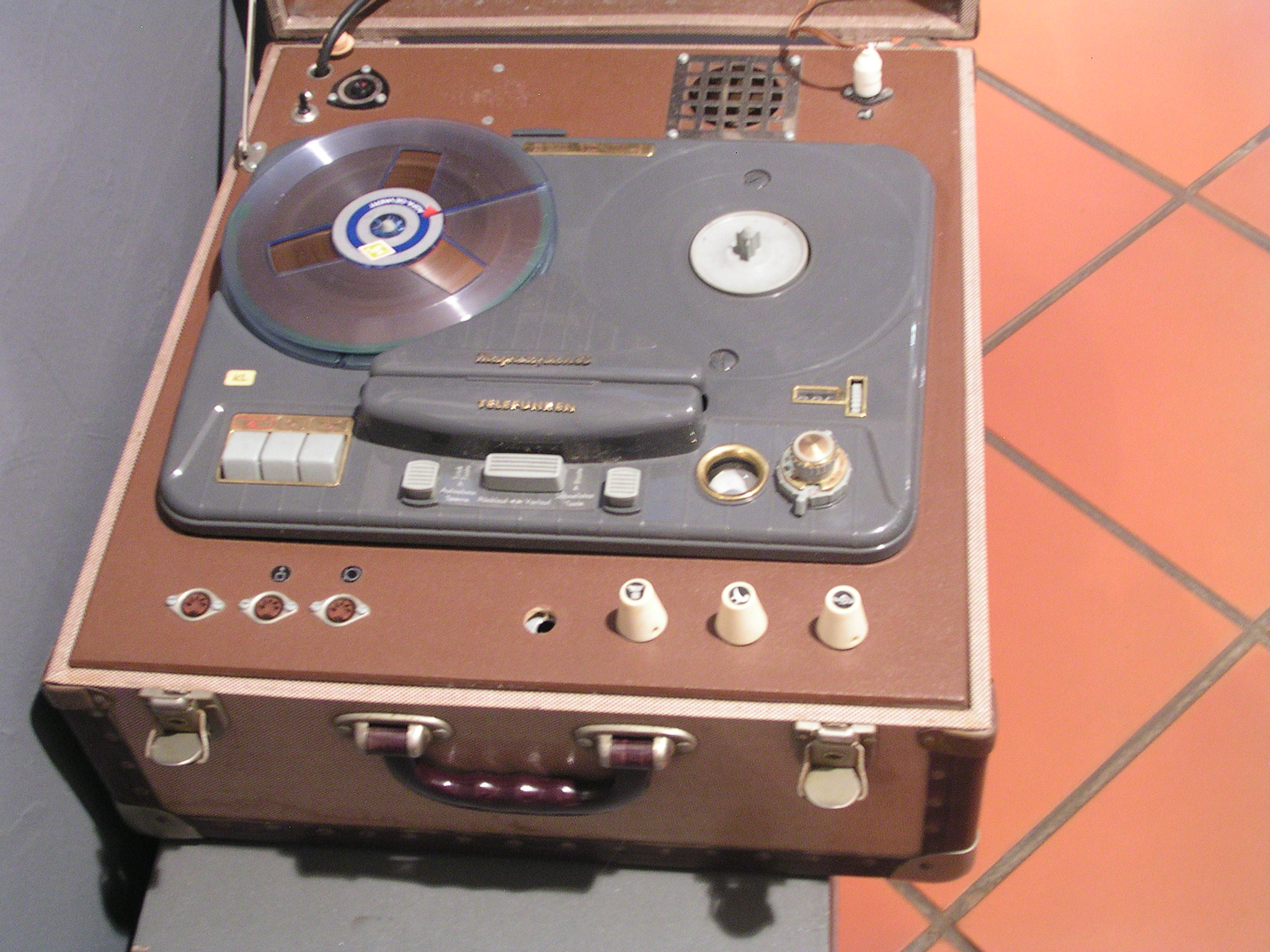 Telefunken Magnetophon 85 - Schul-Tonbandgerät von 1960